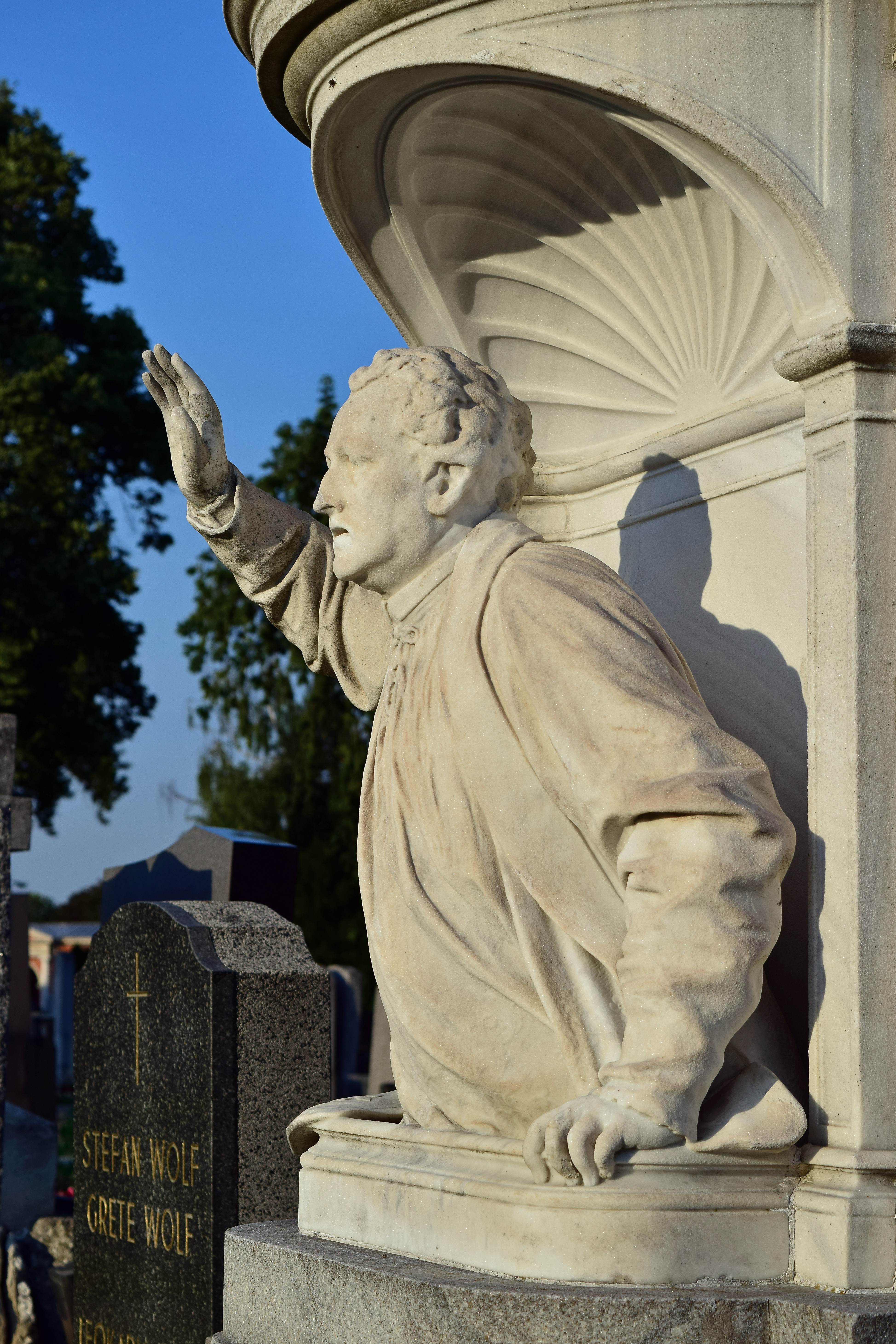 Ehrenhalber gewidmetes Grab von Anton Füster auf dem Wiener Zentralfriedhof, Gruppe 15 E, geschaffen von Bildhauer Josef Lax.